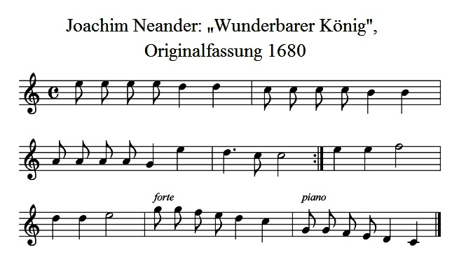 Originalfassung der Melodie Wunderbarer König (Gott ist gegenwärtig) in: Joachim Neander, Glaub- und Liebes-Übung: Auffgemuntert durch einfältige Bundes-Lieder und Danck-Psalmen, 1680